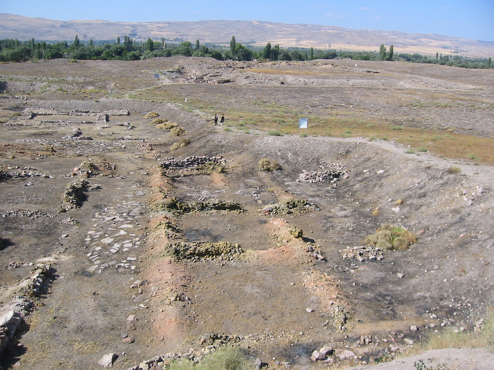 Kültepe, Turkey (old name: Karum, Kaneš)